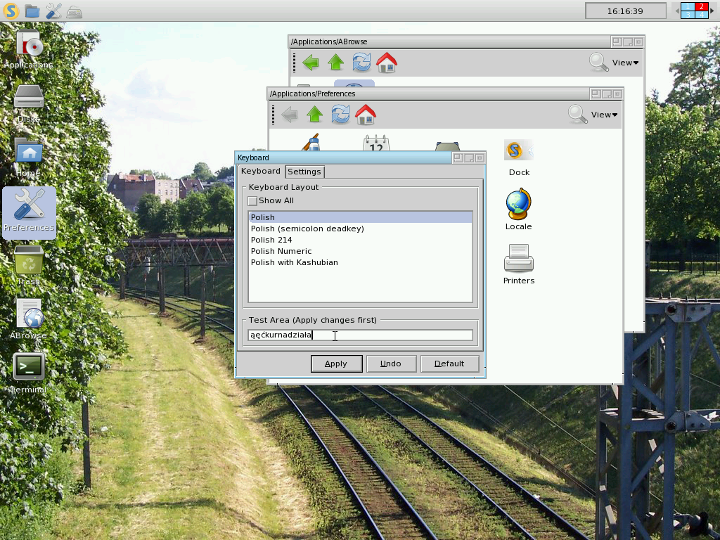 Syllable z klawiaturą polską